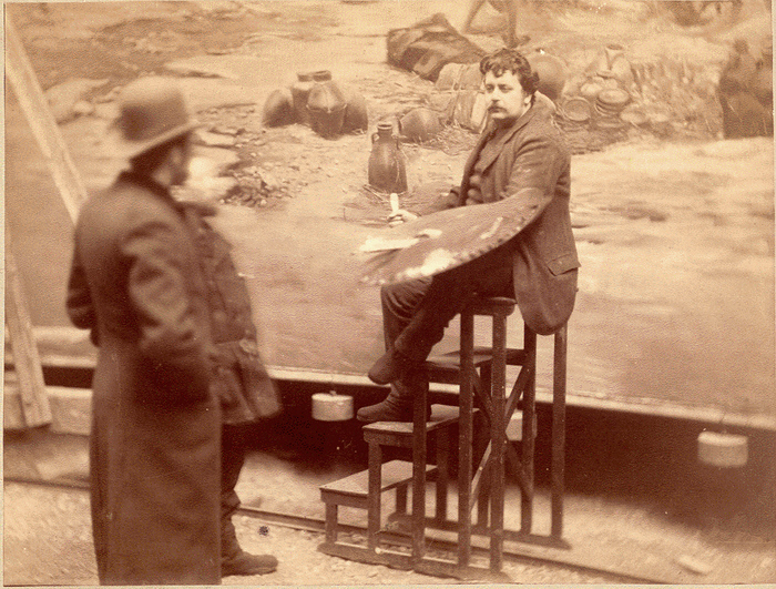 Auftraggeber des Panoramas, Joseph Halder, bei Bruno Piglhein am Panorama im eigens hierfür errichteten Panoramagebäude an der Goethe-Straße 45 in München.